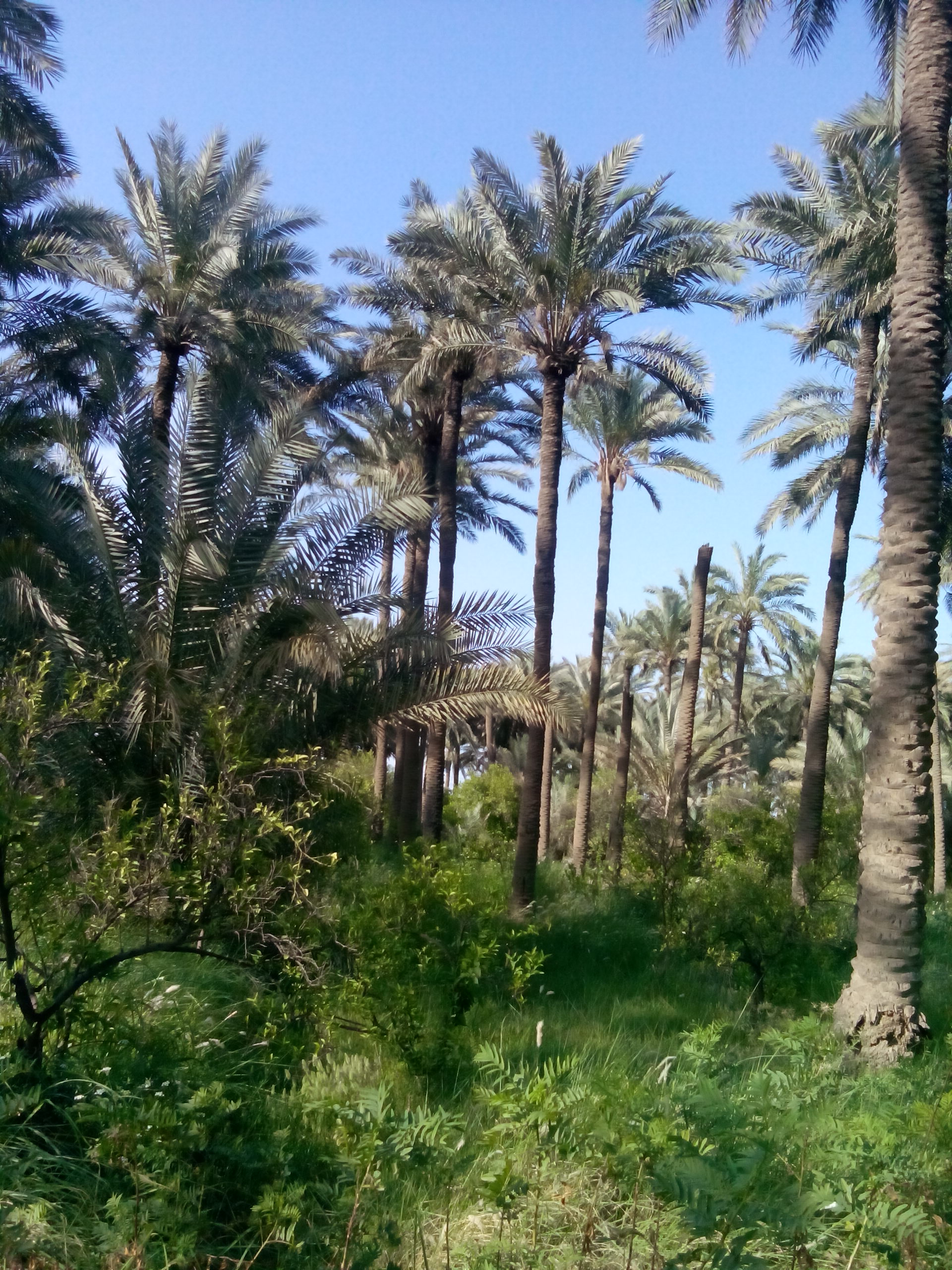 بستان نخيل في قرية تابعة لناحية المحمودية (الأسود) في مدينة الخالص شرق العراق